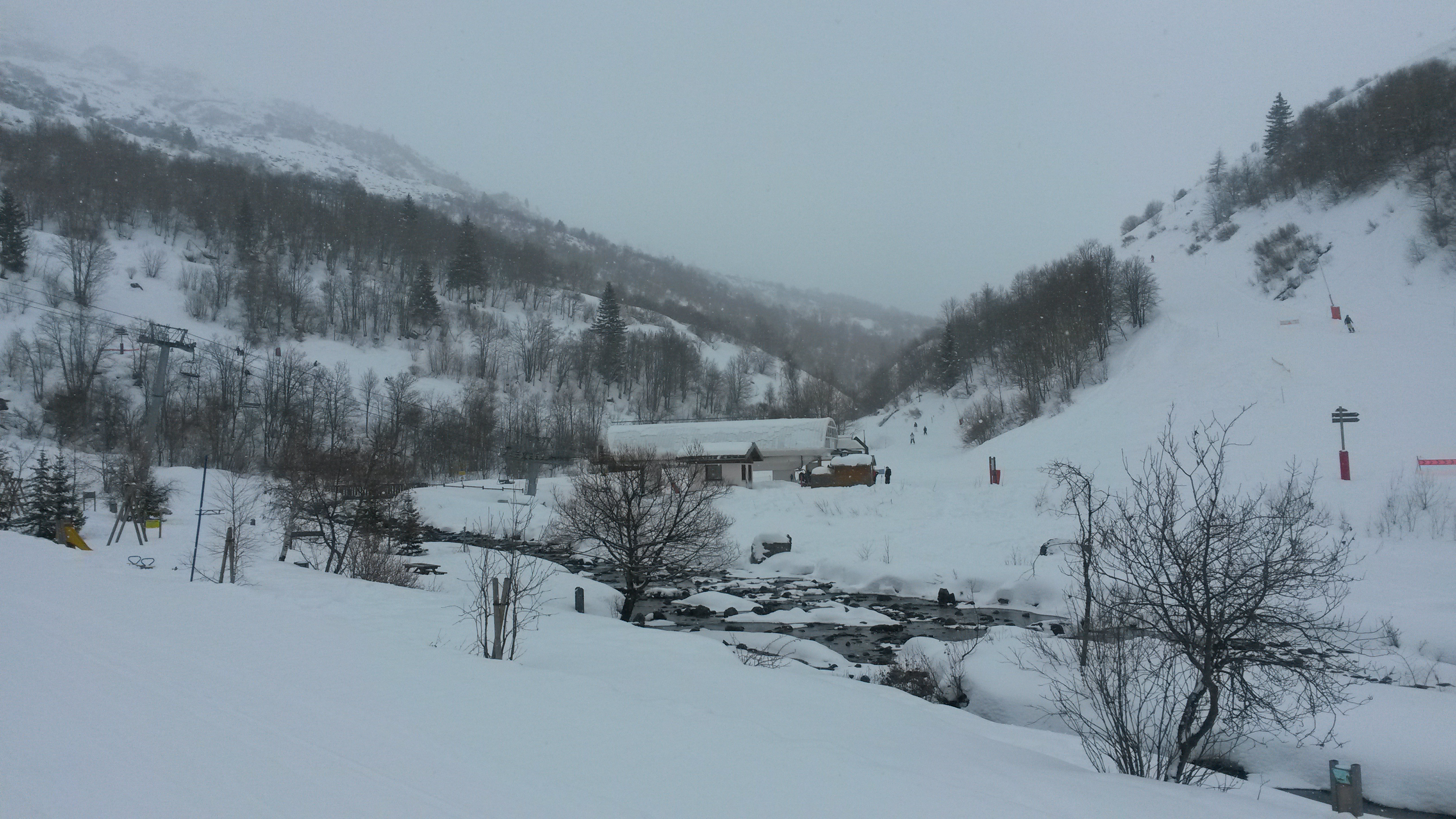 La gare de départ du télésiège des Inversins.